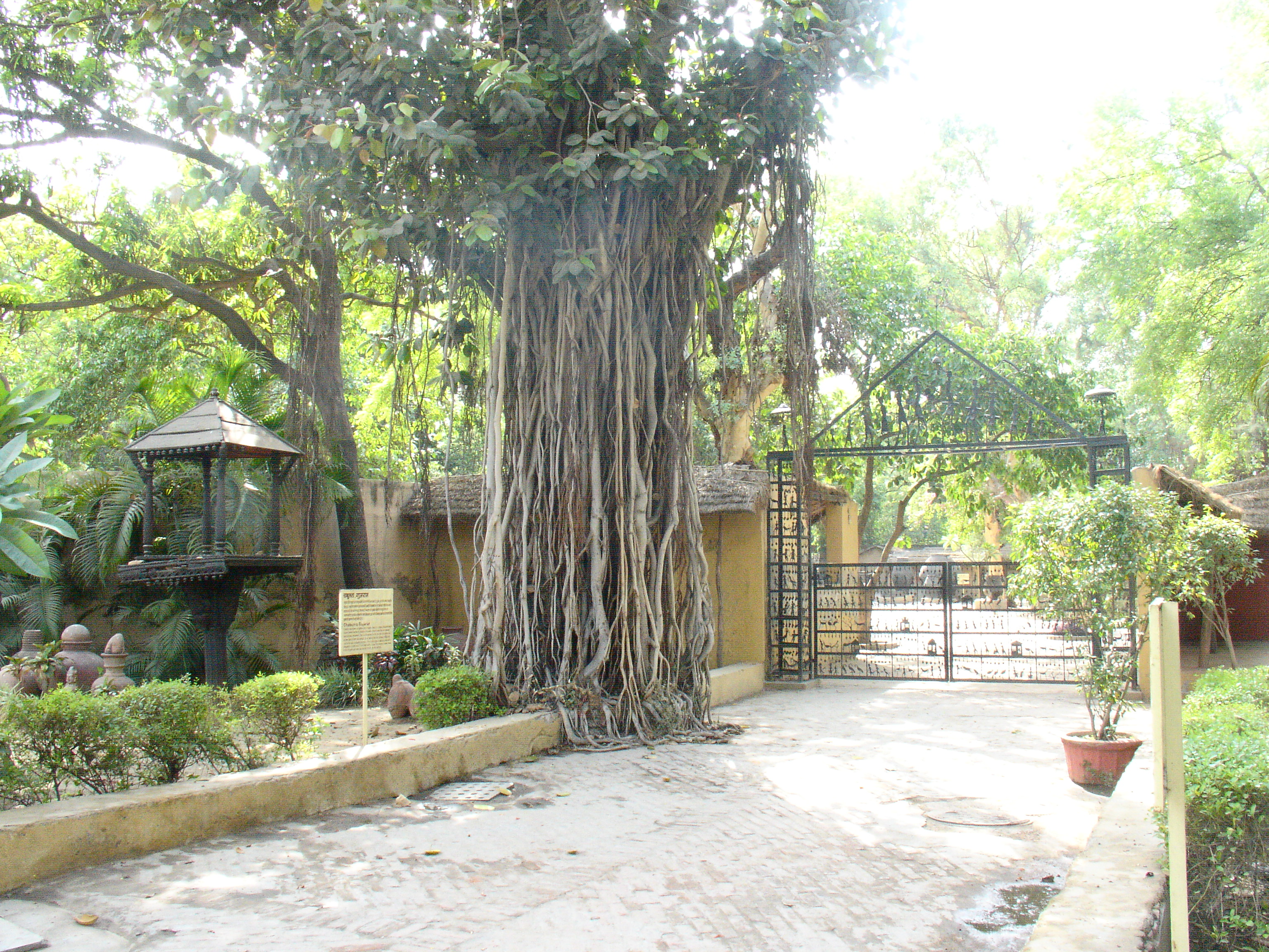 शिल्प संग्रहालय का ग्राम झांकी क्षेत्र